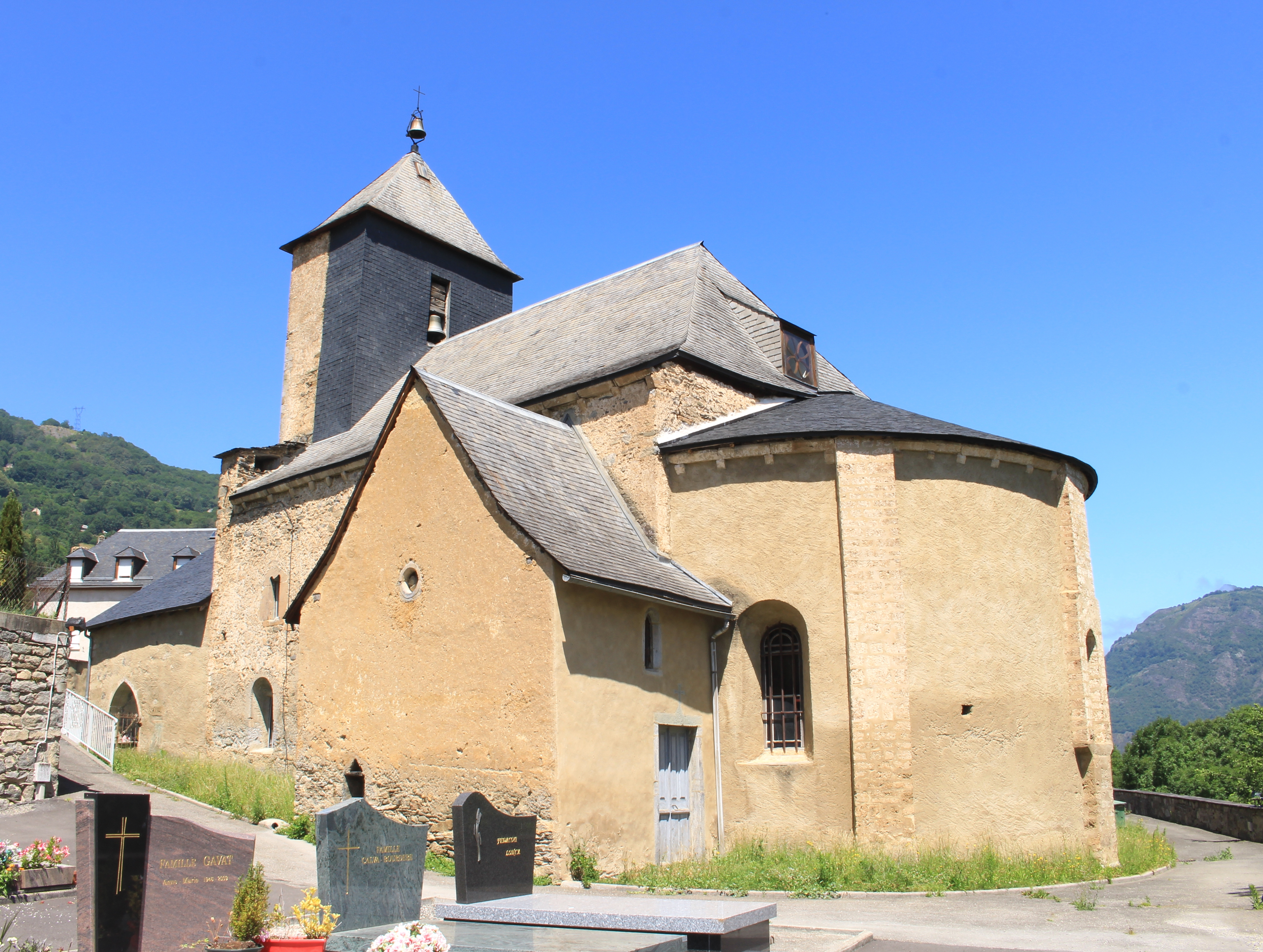 Église Saint-Julien de Sazos (Hautes-Pyrénées)